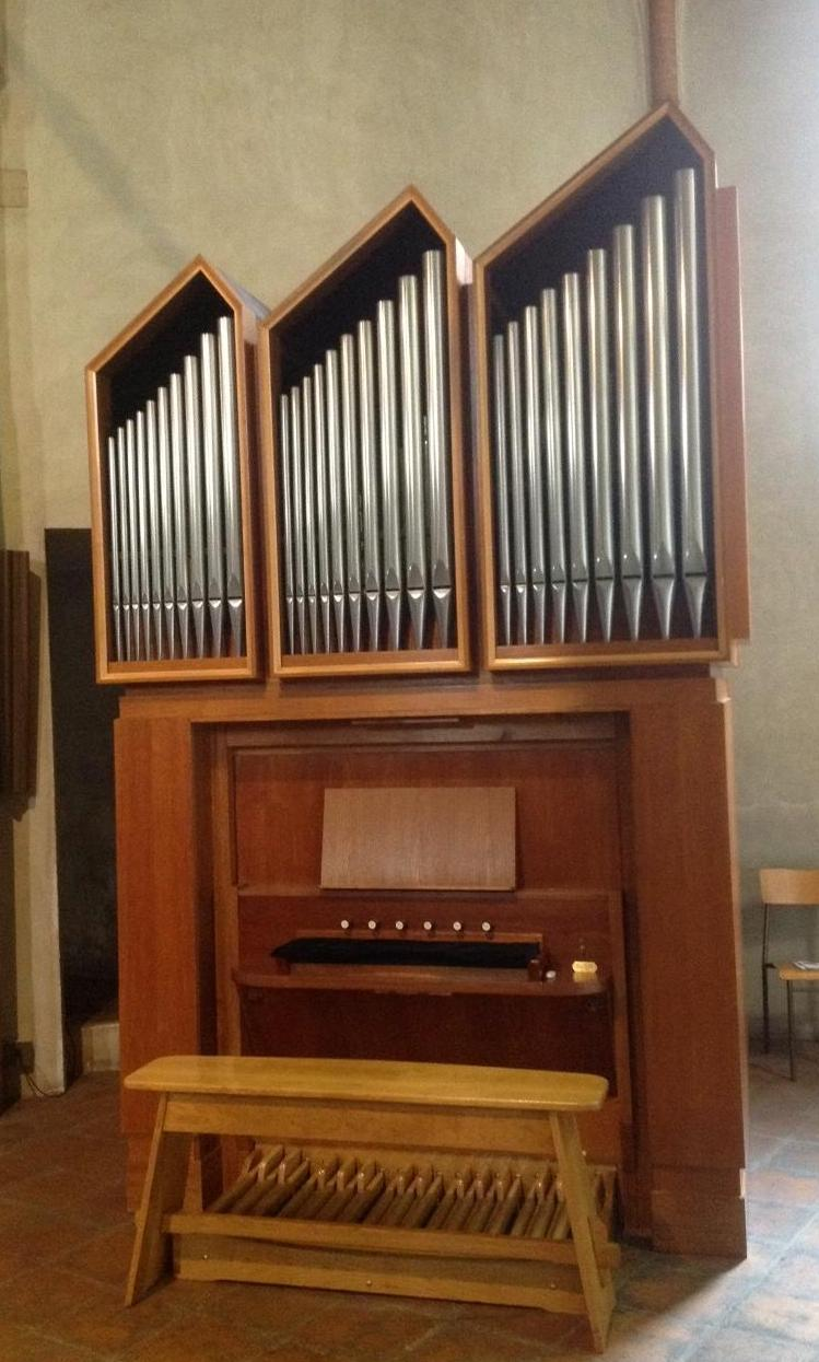 L'organo a canne della chiesa di Santa Maria Incoronata a Milano